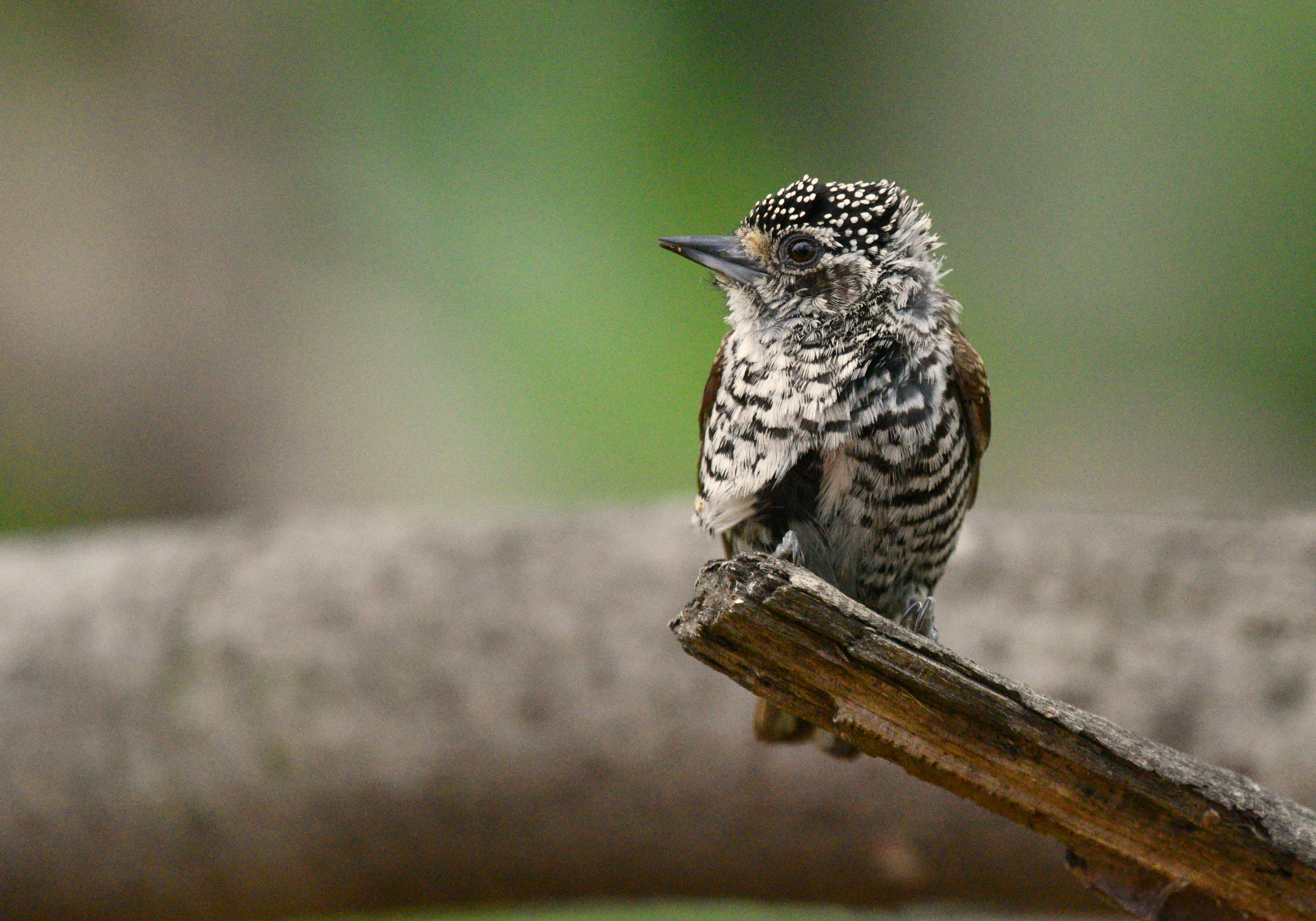 Picumnus cirratus (hembra) en el patio de "La Casita de la Abuela" Asunción, Paraguay